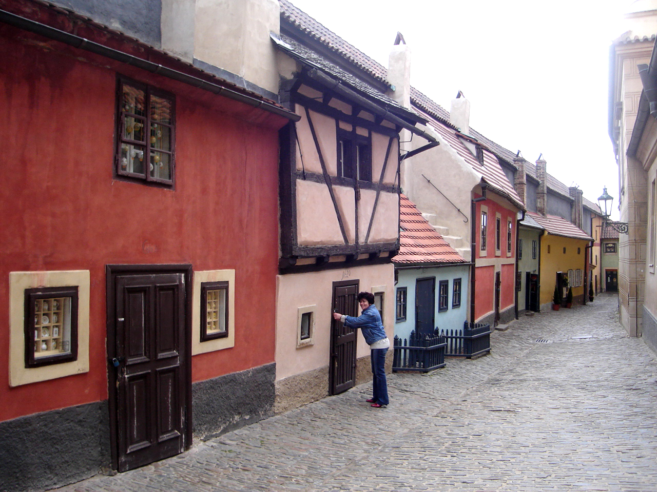 Kézművesek utcája Prágában